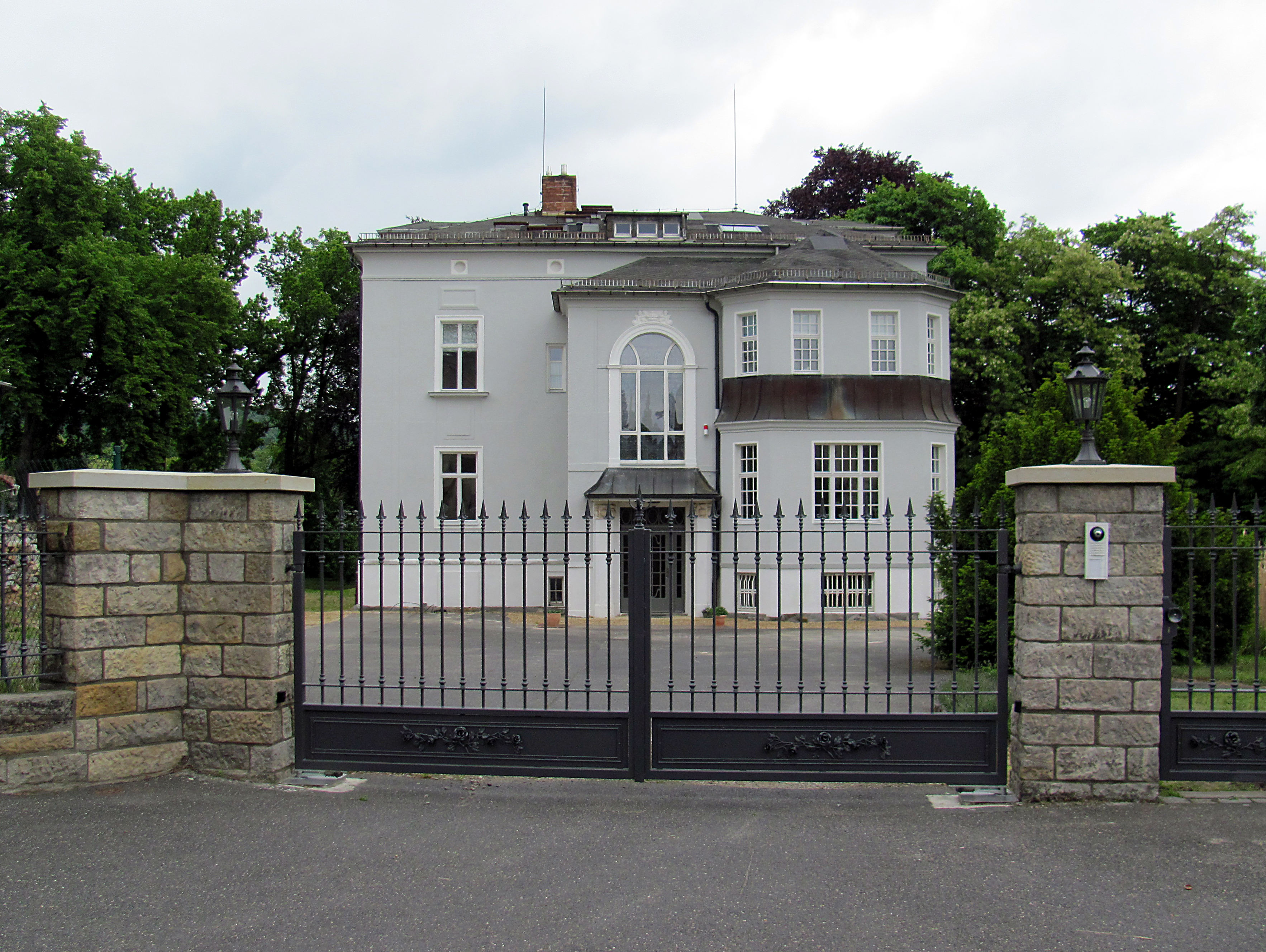 Radebeul-Niederlößnitz, Villa Schuchstraße 4